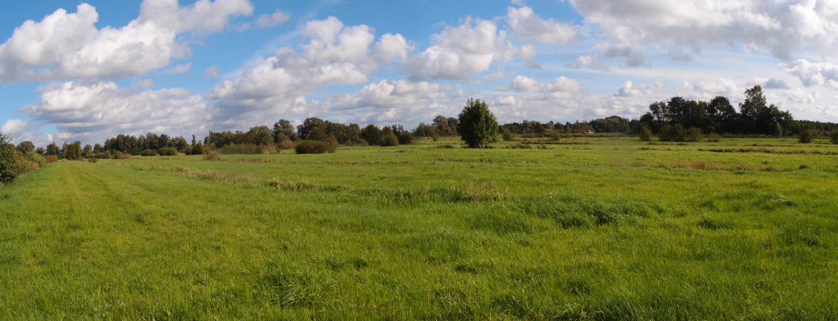 Mähwiesen in den südlichen Kircherwerder Wiesen